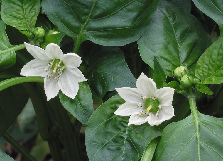 zelfgemaakte foto van bloemen van paprika; half juli